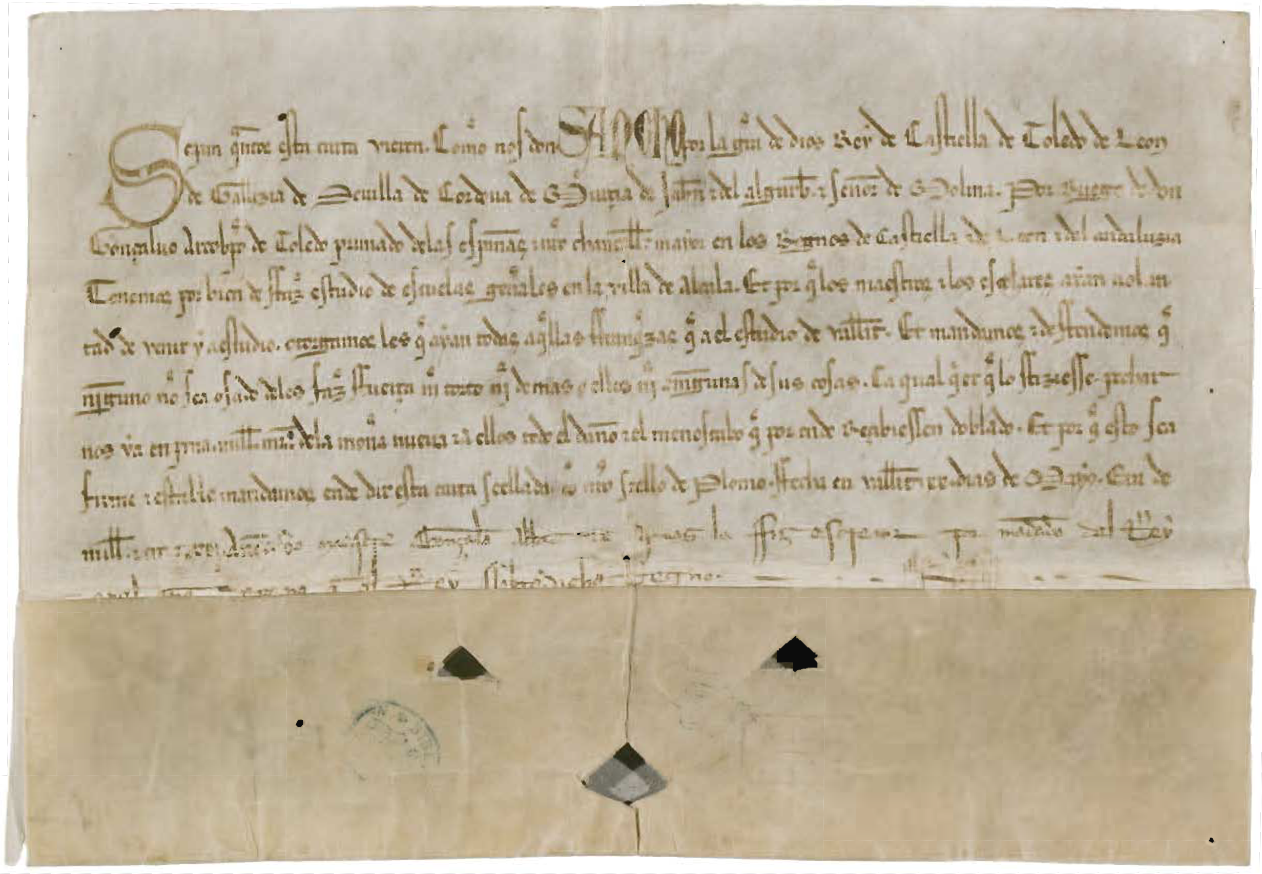 Privilegio de Sancho IV de Castilla creando los Estudios Generales de Alcalá de Henares el 20 de mayo de 1293. Carta plomada original en pergamino, sin sello, de 235 x 160 mm, firmada en Valladolid.[1]